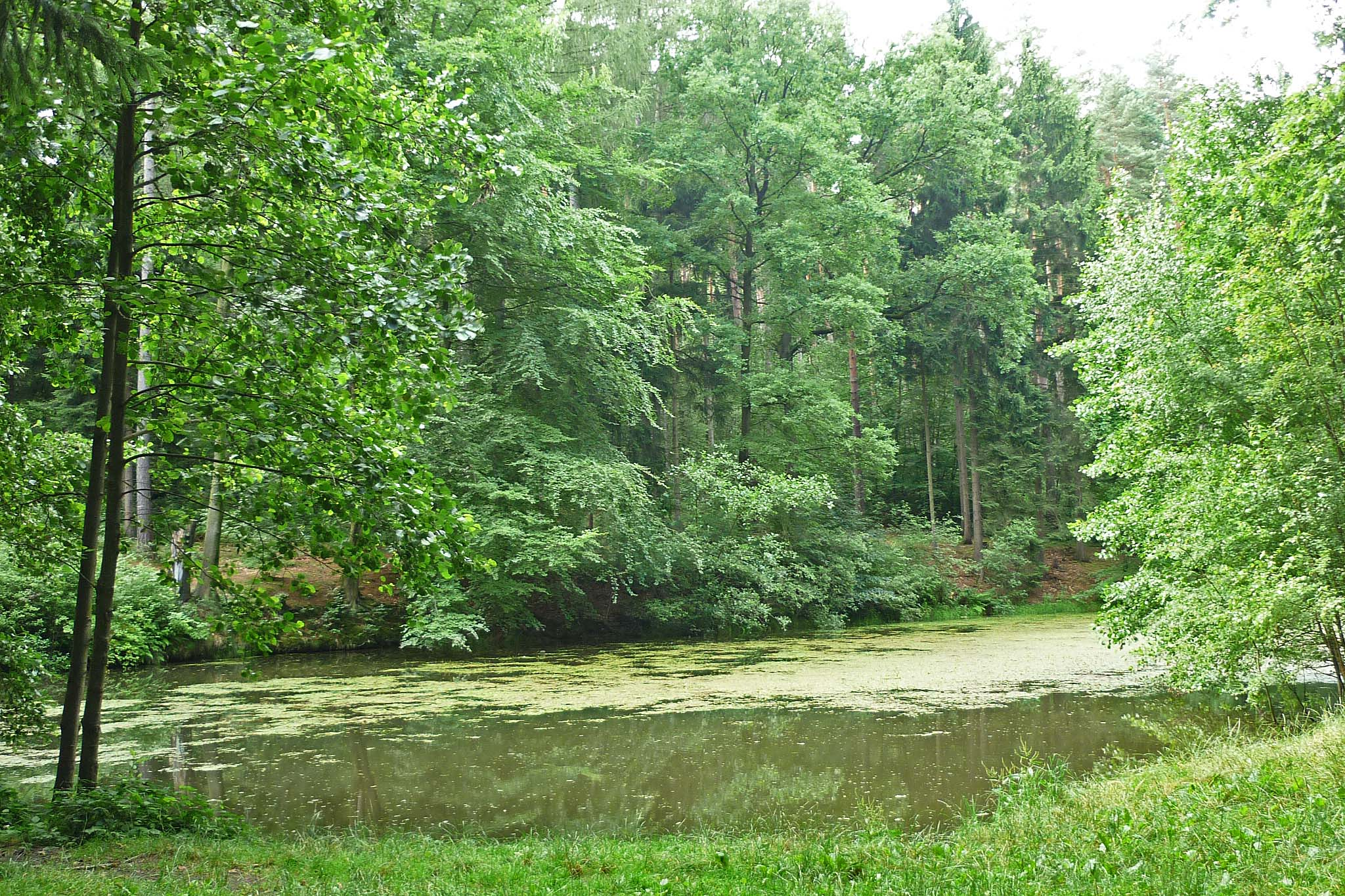 Teich im Poisenwald bei Freital